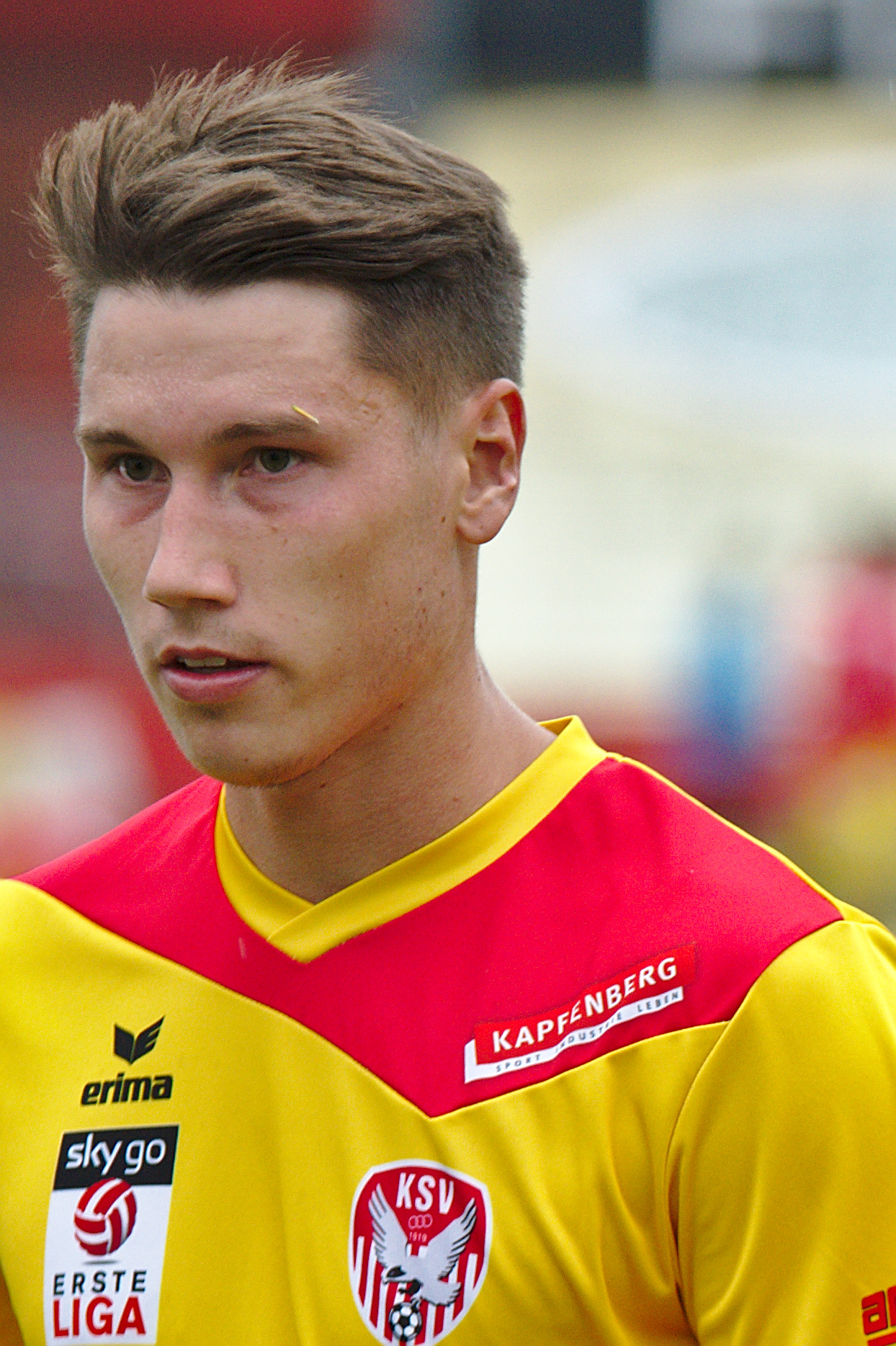 Saisonvorbereitungsspiel Admira Wacker Mödling gegen Kapfenberger SV am 17.6.2017, Bild zeigt: Manuel Haas